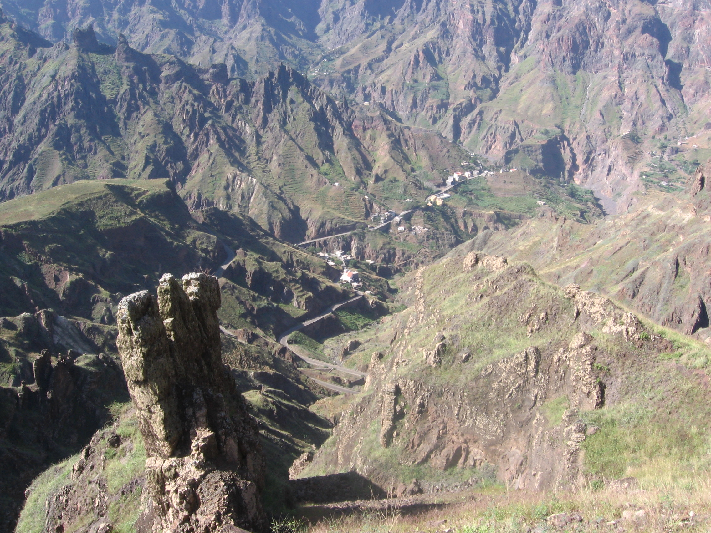 Vista do vale da Ribeira da Garça, Ribeira Grande, Santo Antão, Cabo Verde